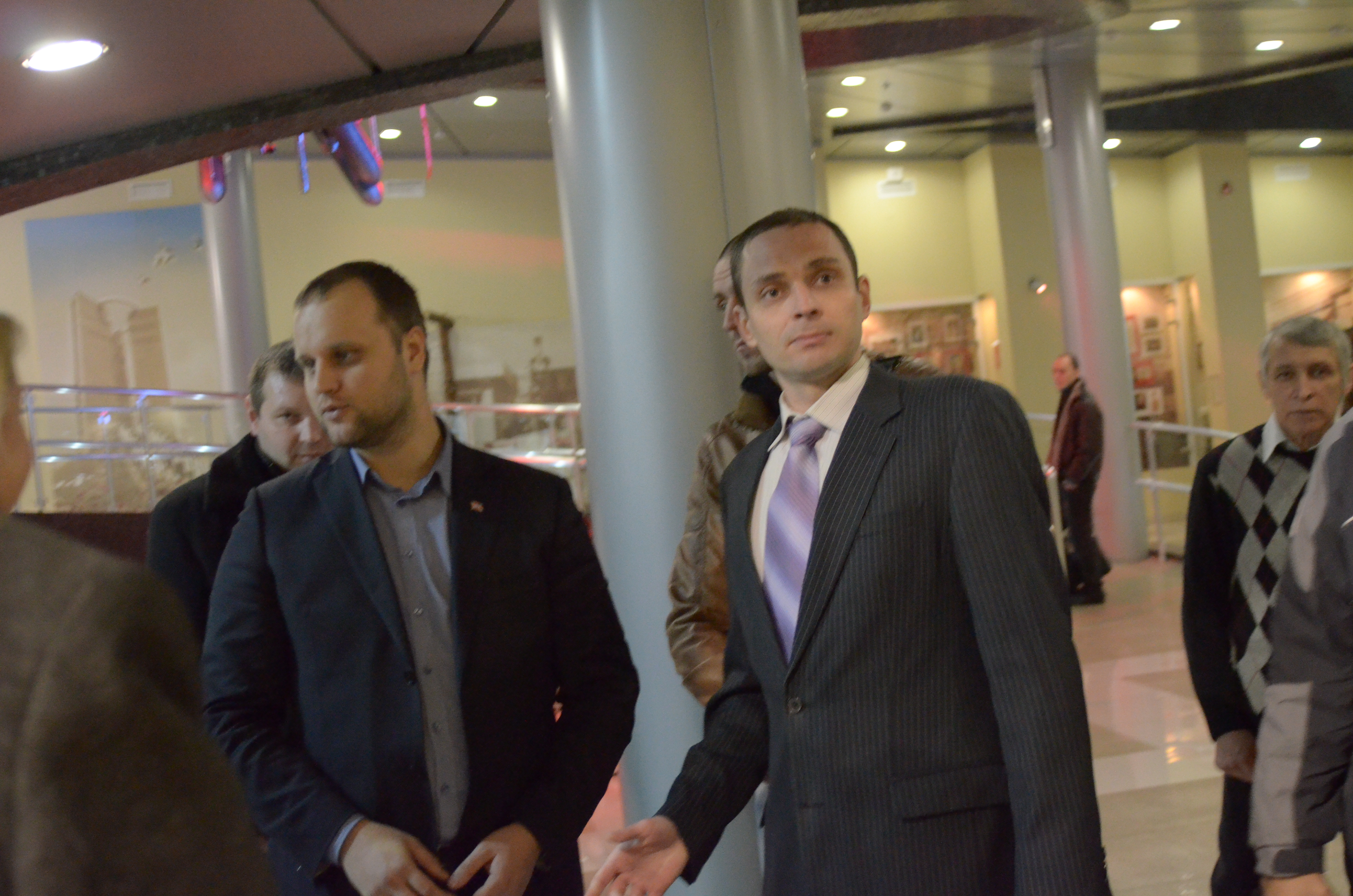 Мероприятия, посвященные 90-летию со дня образования Донецкого краеведческого музея